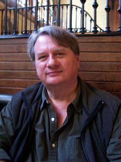 Lingua Franca Nova: Imaje de C. George Boeree